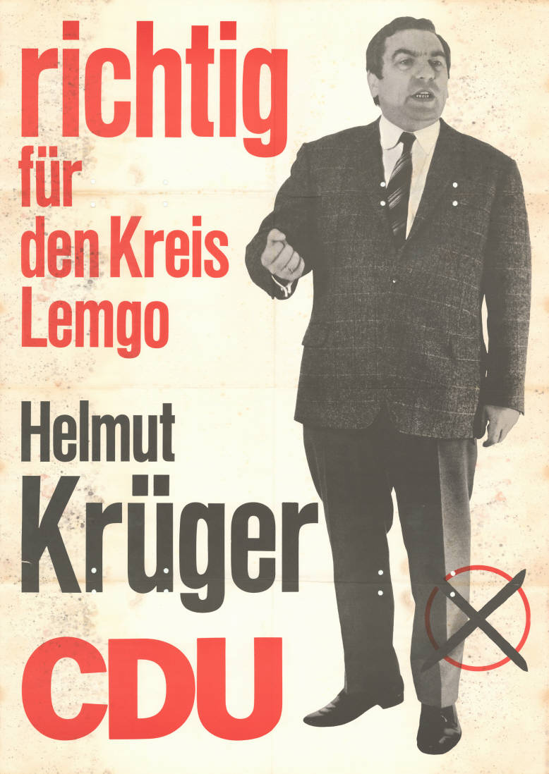 richtig für den Kreis Lemgo Helmut Krüger CDU Abbildung: Foto - Stimmkreuz Kommentar: Auf der Rückseite teilweise mit Kugelschreiber beschriftet Plakatart: Kandidaten-/Personenplakat mit Porträt Objekt-Signatur: 10-009 : 648 Bestand: Landtagswahlplakate Nordrhein-Westfalen (10-009) GliederungBestand10-18: Landtagswahlplakate Nordrhein-Westfalen (10-009) » CDU Lizenz: KAS/ACDP 10-009 : 648 CC-BY-SA 3.0 DE